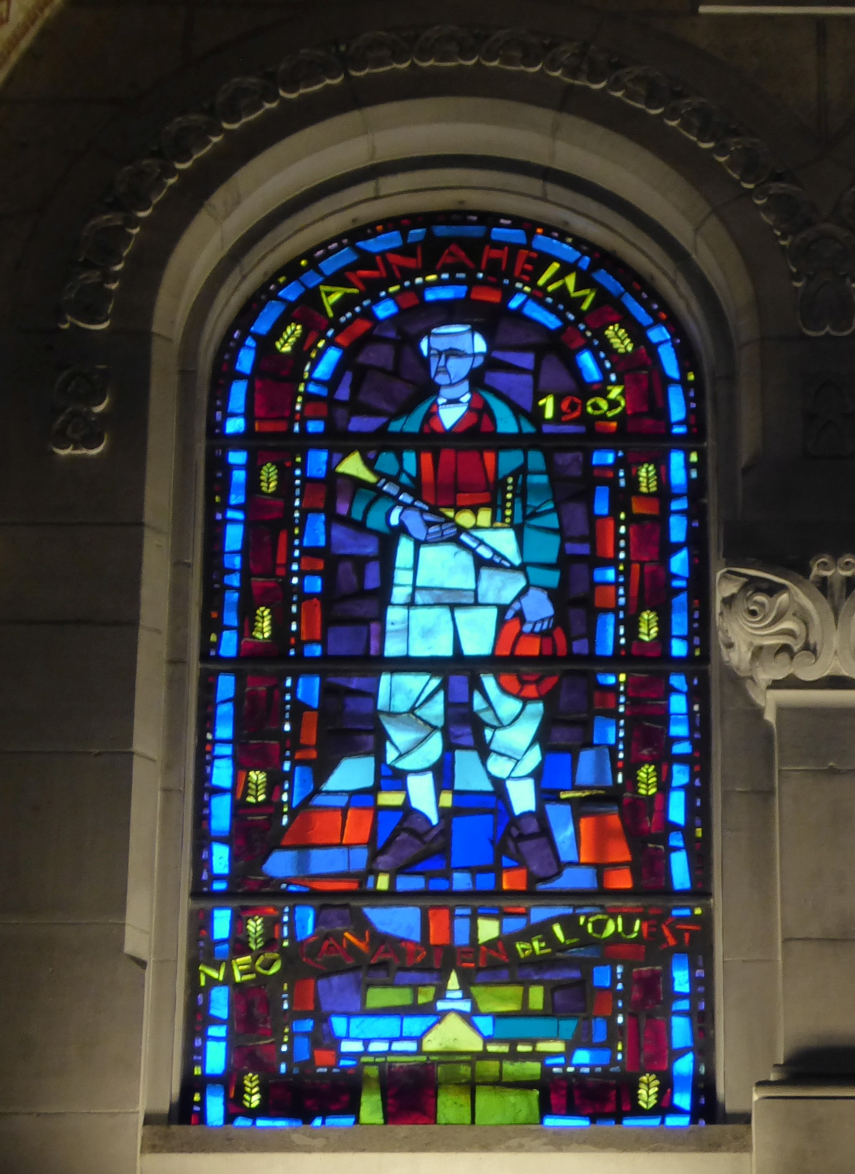 Vitrail à la basilique Saint-Anne-de-Beaupré illustrant un colon « canadien » de Saskatchewan.